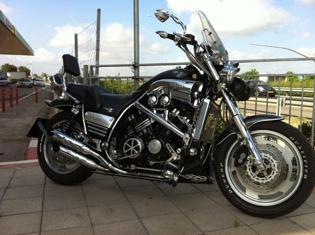 yamaha vmax 1999